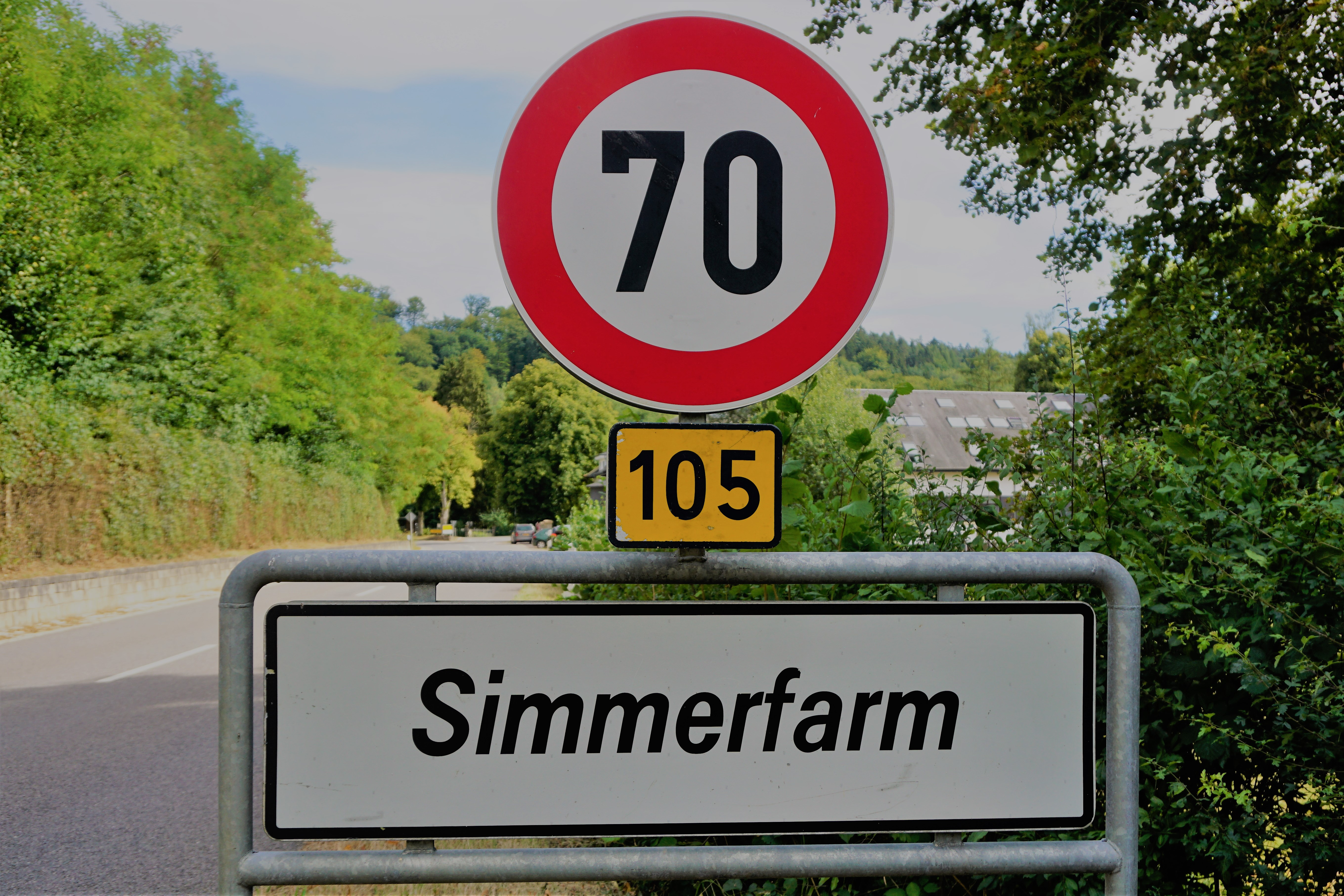 Lieu-dit Simmerfarm, commune de Habscht. Panneau de localisation.